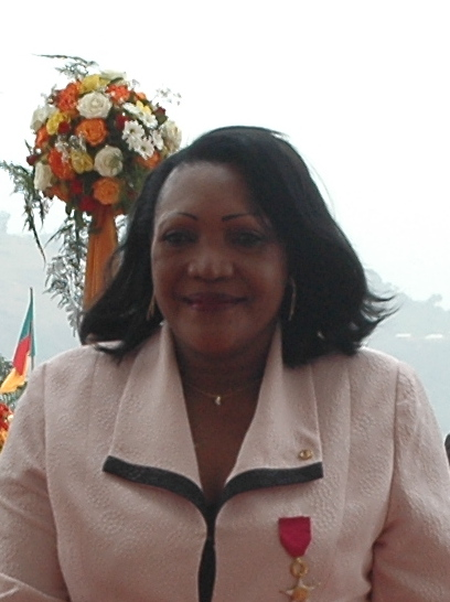 Mme Nicole Okala à l'entrée du palais de l'unité lors de la cérémonie de présentation des voeux au Président Paul Biya